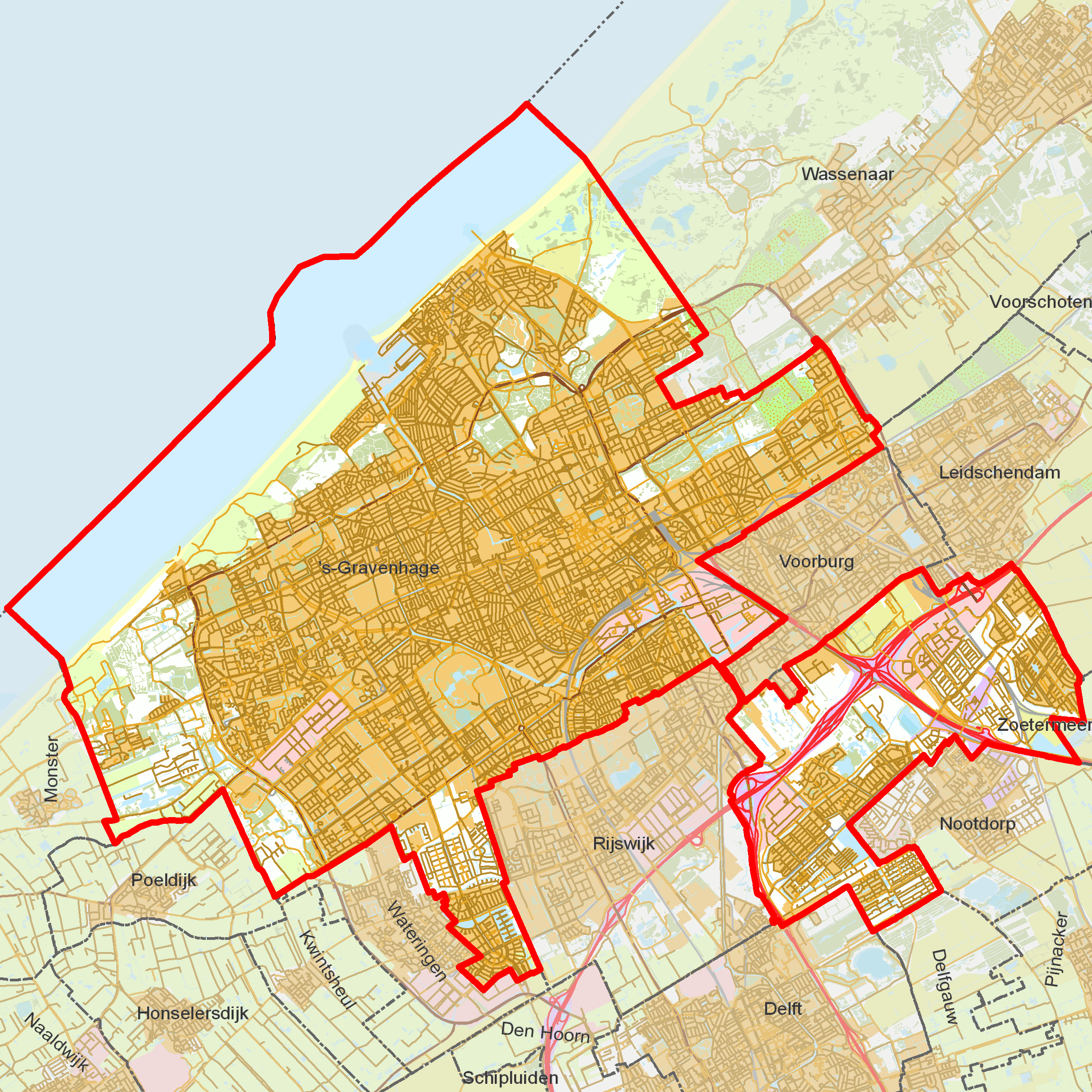 BAG woonplaatsen - Gemeente 's-Gravenhage.png